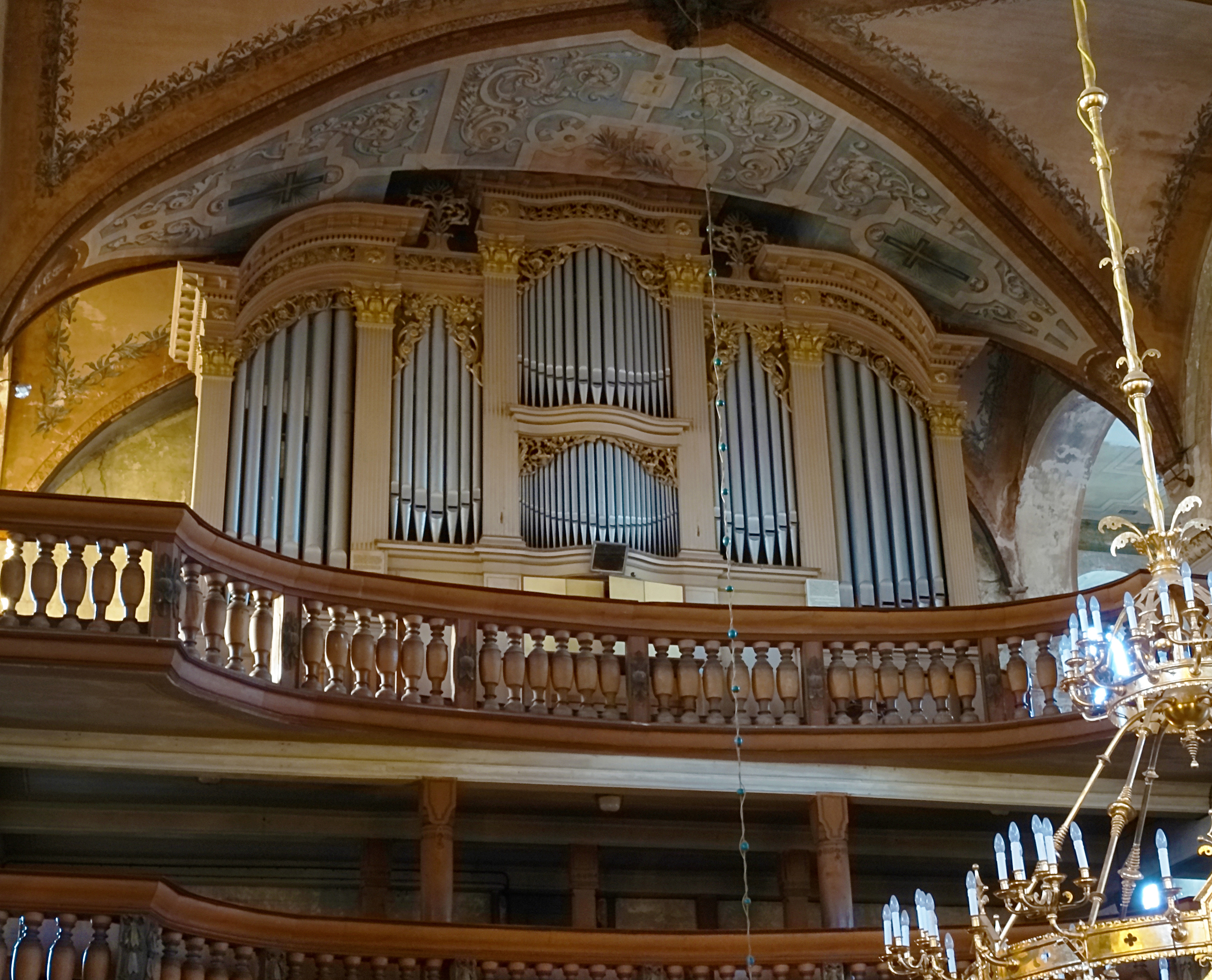 Die Orgel von Johann Tobias Gottfried Trost (1704 Neubau) wurde 1842 durch Johann Michael Hesse dem Jüngeren und 1978 durch Schönefeld (Orgelbau) repariert. Sie hat 21 Register, 2 Manuale und Pedal.